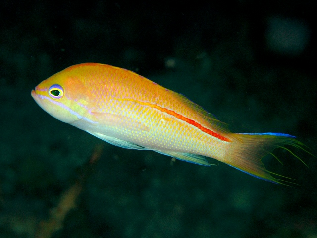 イトヒキコハクハナダイ♂ Pseudanthias rubrolineatus